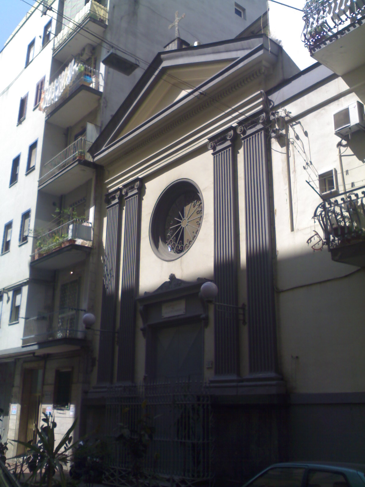 Chiesa di Santa Maria della Purità e Sant'Anna (Napoli)